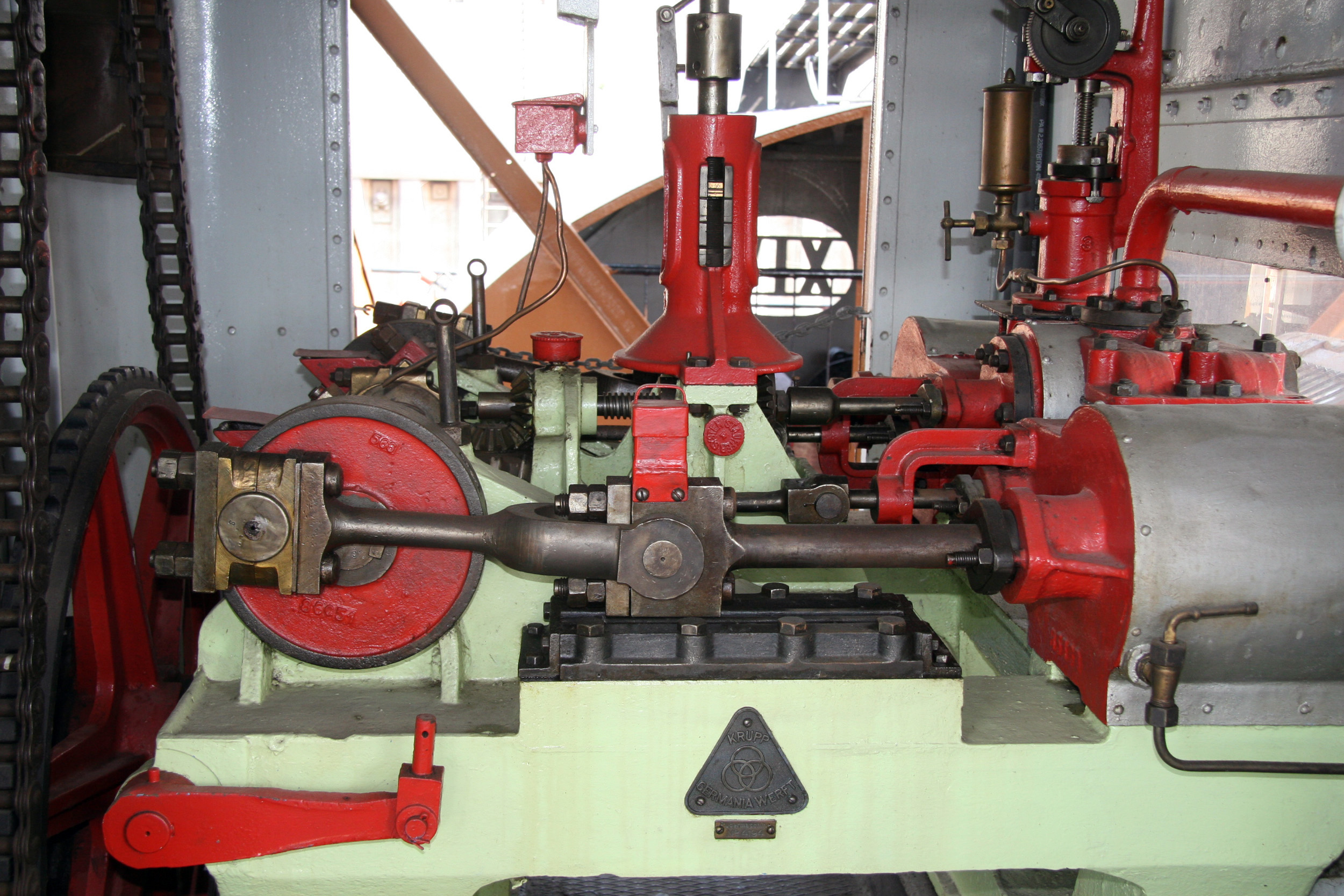 Rudermaschine mit Dampfantrieb